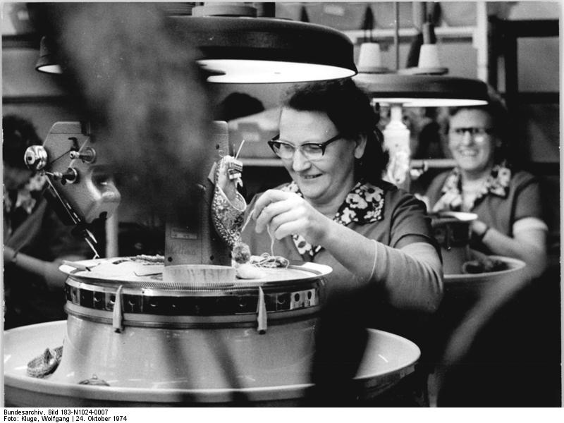 ADN-ZB-Kluge-24.10.74-ku-Leipzig: Im neuen Haus der Dienstleistungen bieten die rund 680 Mitarbeiter in vier modern eingerichteten Etagen dem Kunden mehr als 90 Leistungsarten an. Kettlerin Jutta Hoppe fühlt sich in den modern eingerichteten Arbeitsräumen wohl, Grundlage dieses Hauses ist ein Beschluß der Stadtverordnetenversammlung, in dem festgelegt wurde, das ehemalige Leihhaus zu einem Haus der Dienstleistungen umzuwandeln.(vergl.N1024-8N)